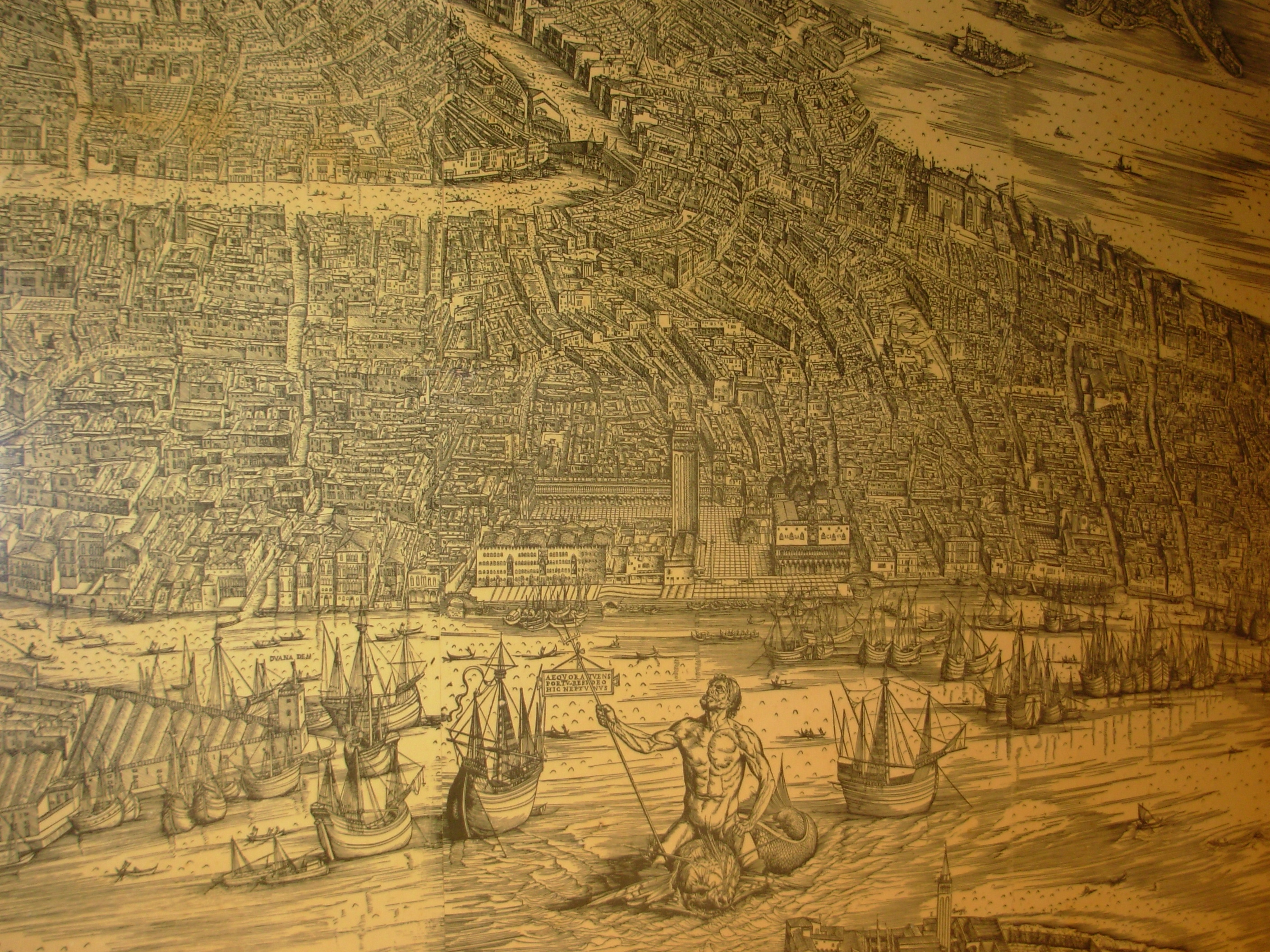 Venetia MD (particolare)